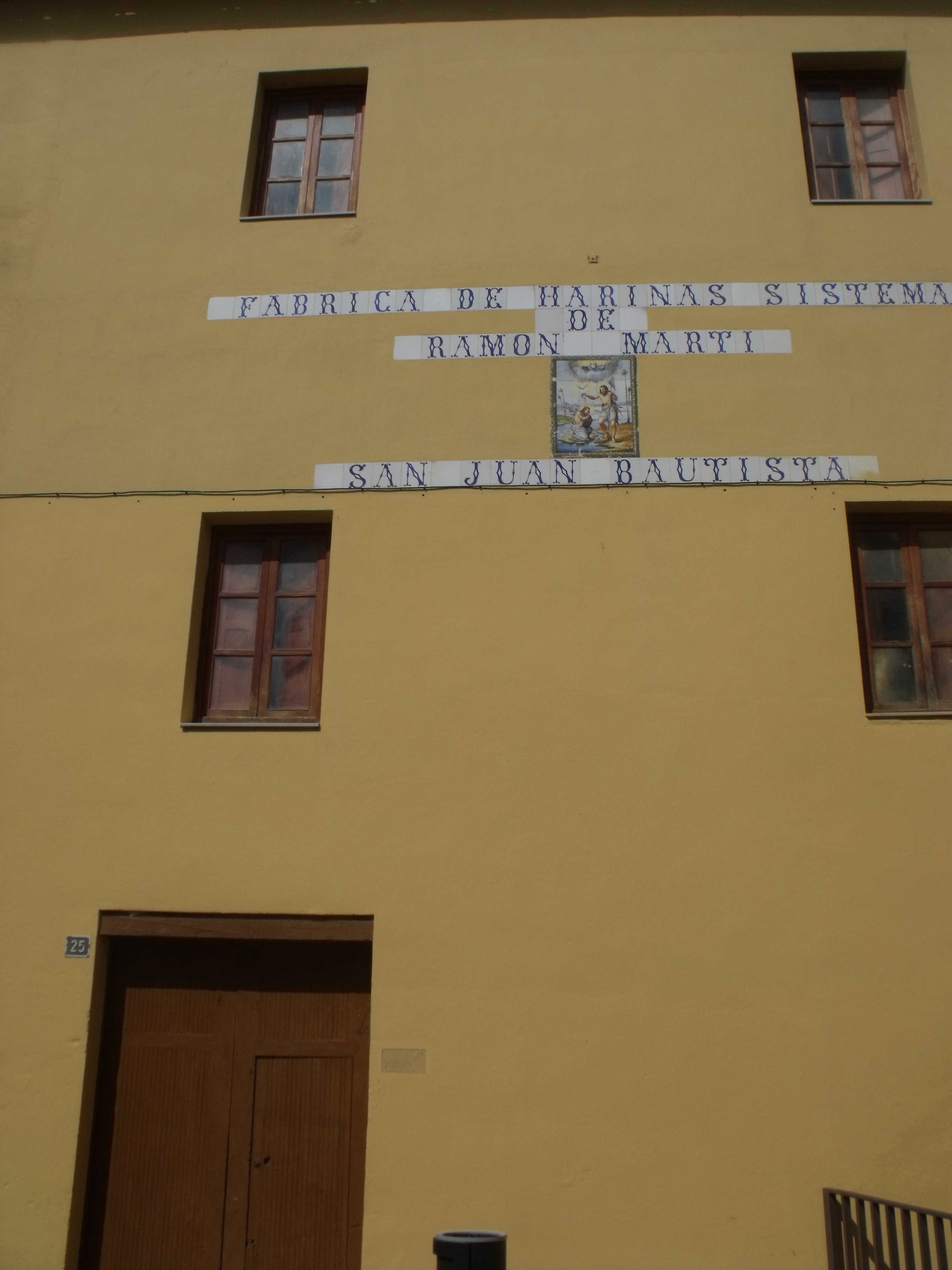 Detalle fachada del molino harinero.